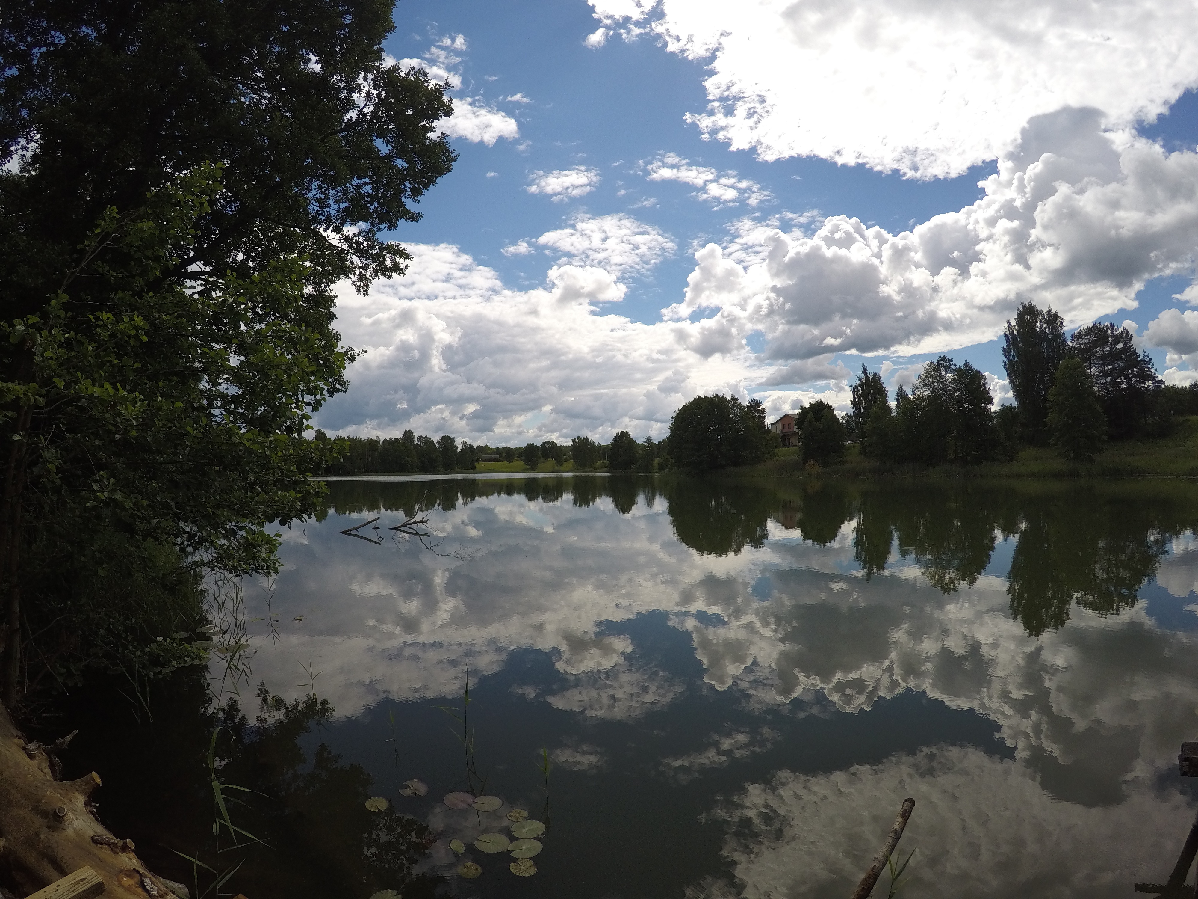 A Pappjärv Kose település északi részén.